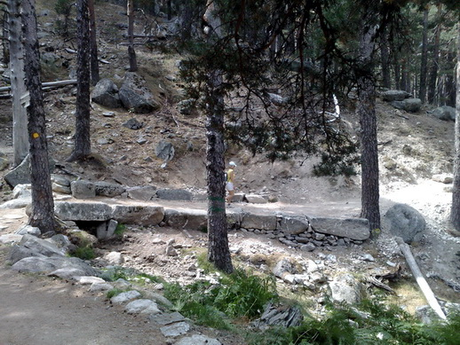 Camino Schmidt- Cruce con arroyuelo.